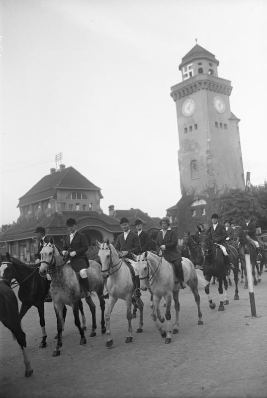 Die Jagd geht auf ! Die erste Scheppjagd-Saison wurde von dem Parforcejagd-Club Berlin in Frohnau eröffnet. Die Jagdteilnehmer im roten Rock passieren den idyllischen Bahnhofsplatz in Frohnau.